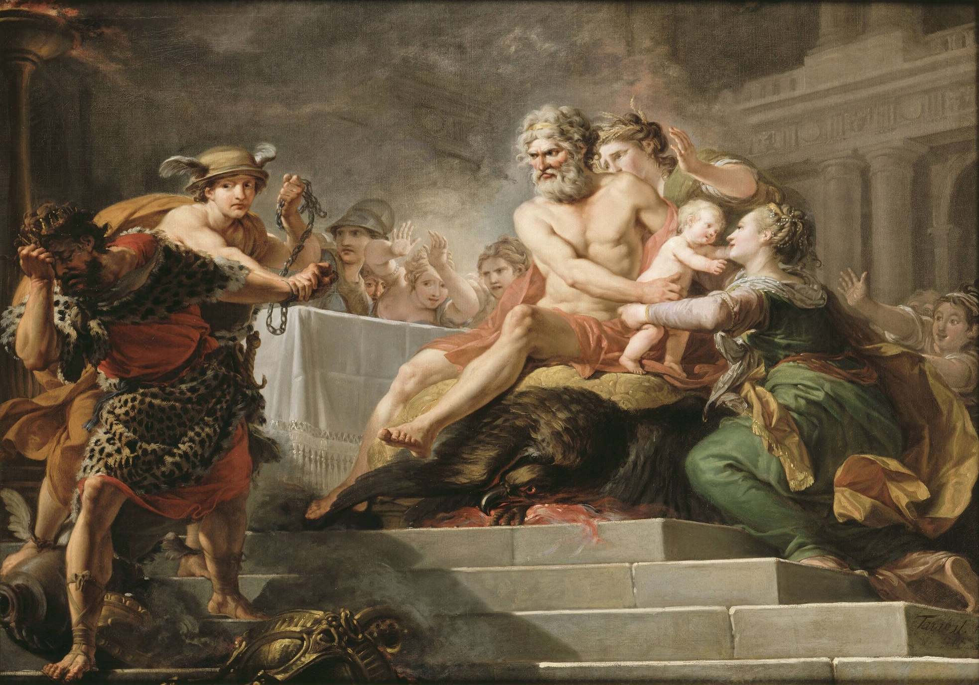 Le festin donné aux dieux par Tantale, Hugues Taraval,1767.